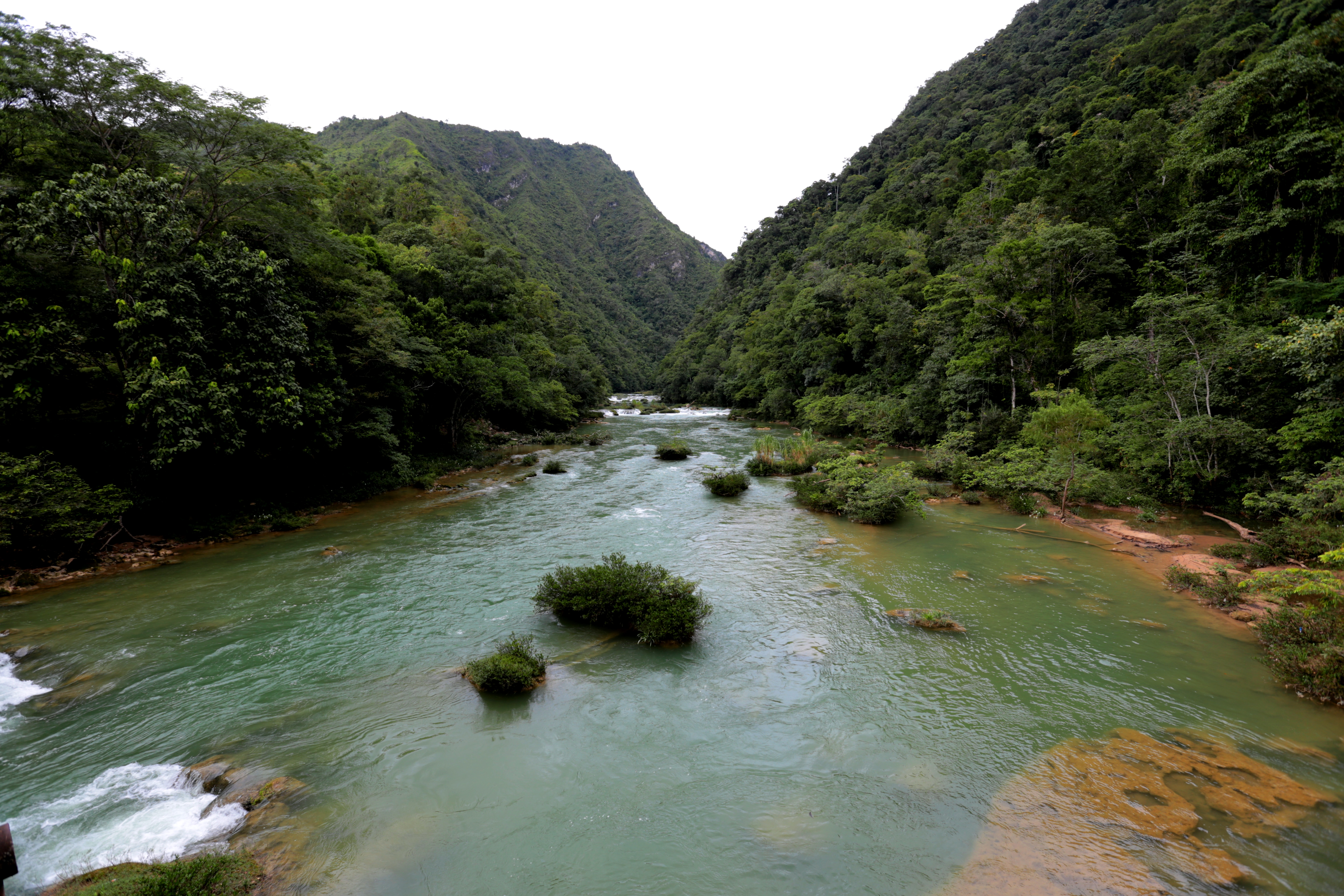 Río Jataté